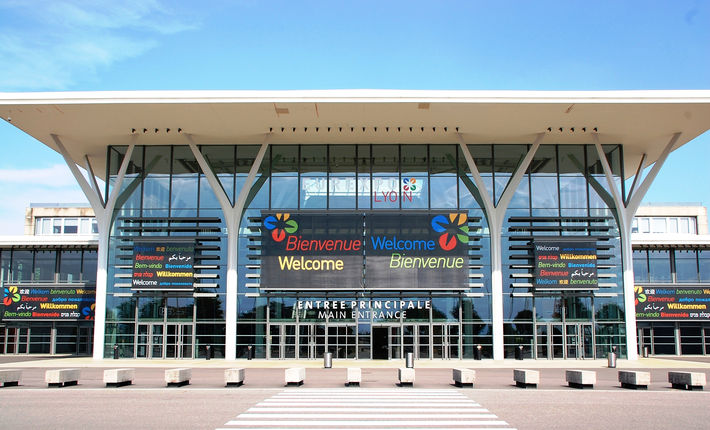 Photographie Eurexpo - vue extérieure